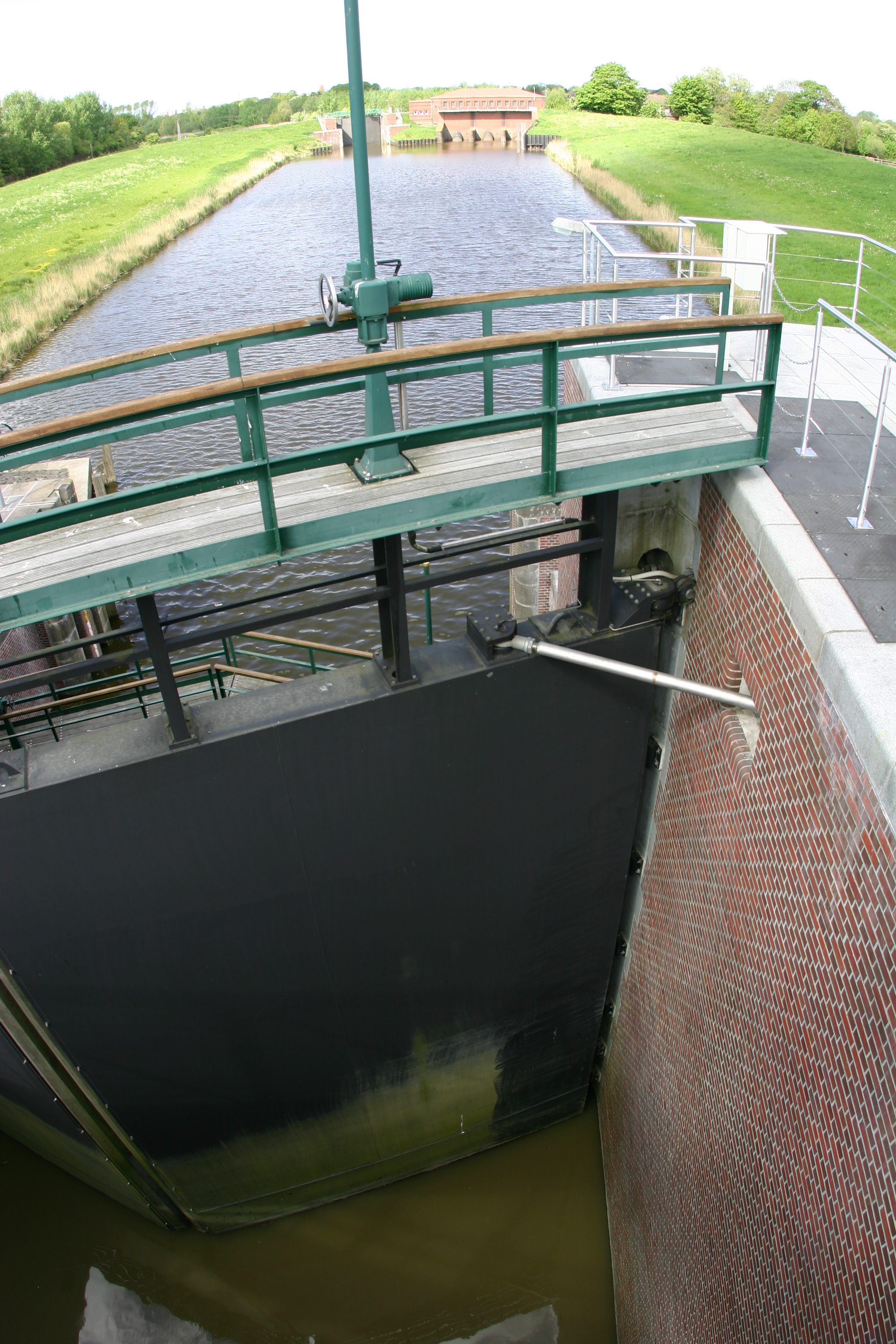 Borssumer Siel (Entwässerungssiel), mit Fisheye-Objektiv aufgenommen